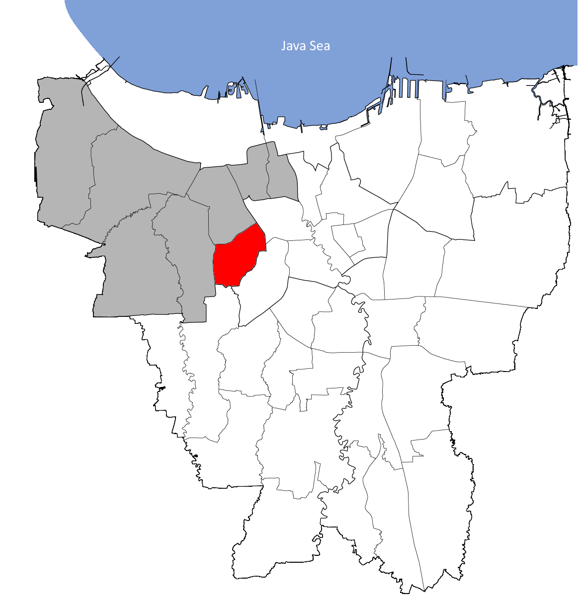 Palmerah;onderdistrict (Kecamatan) van West-Jakarta